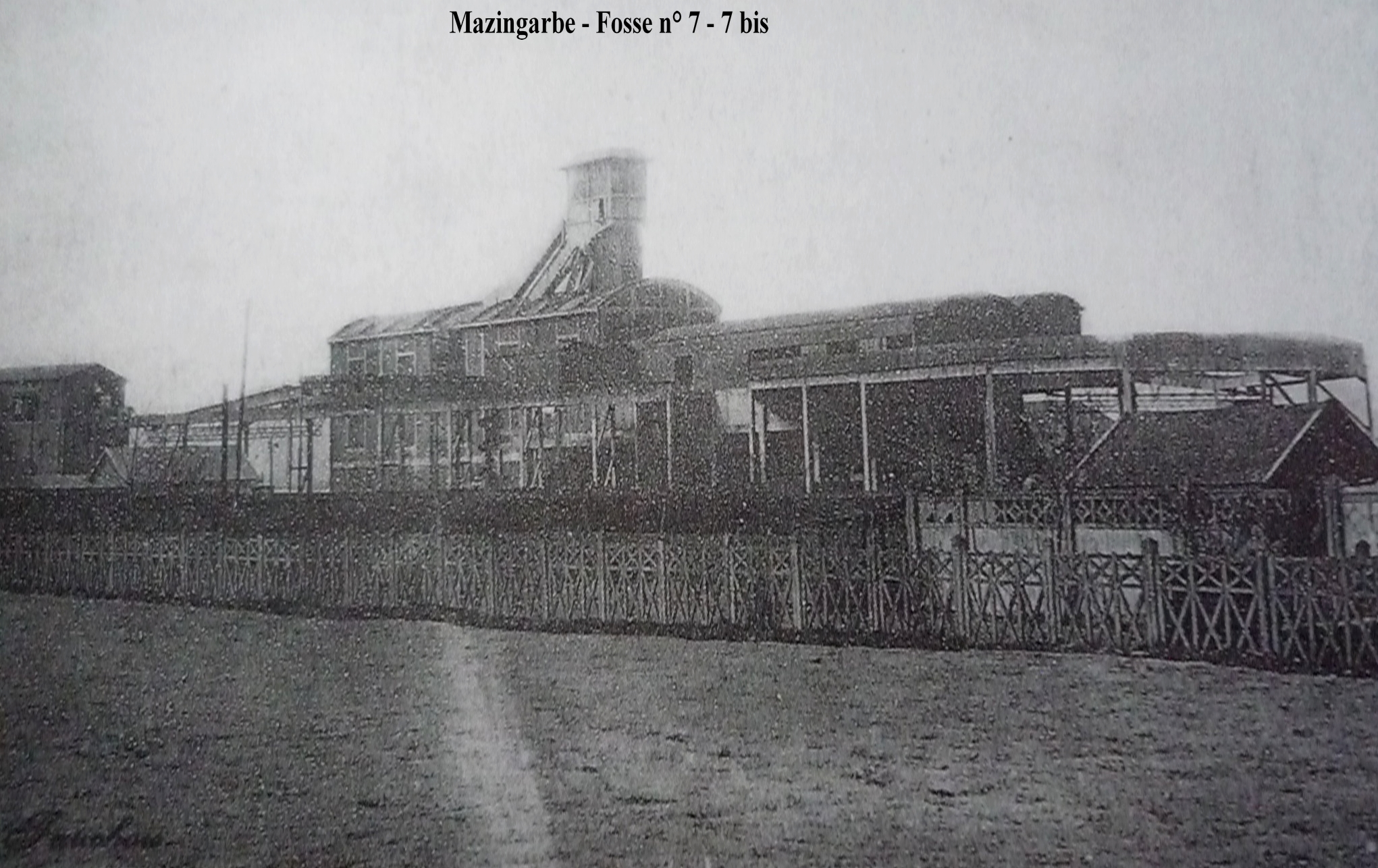 La Fosse n° 7 - 7 bis de la Compagnie des mines de Béthune était un charbonnage constitué de deux puits situé à Mazingarbe, Pas-de-Calais, Nord-Pas-de-Calais, France.